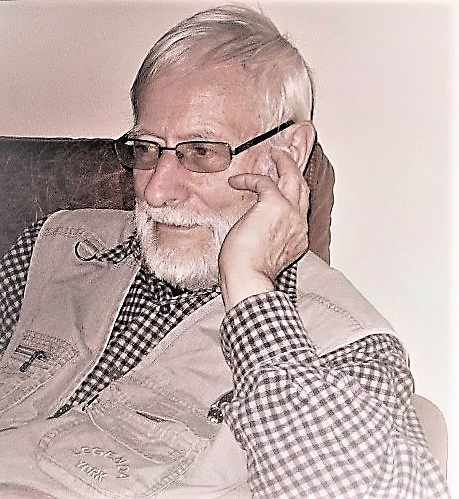 Jerzy Pawłowski w 2011 roku